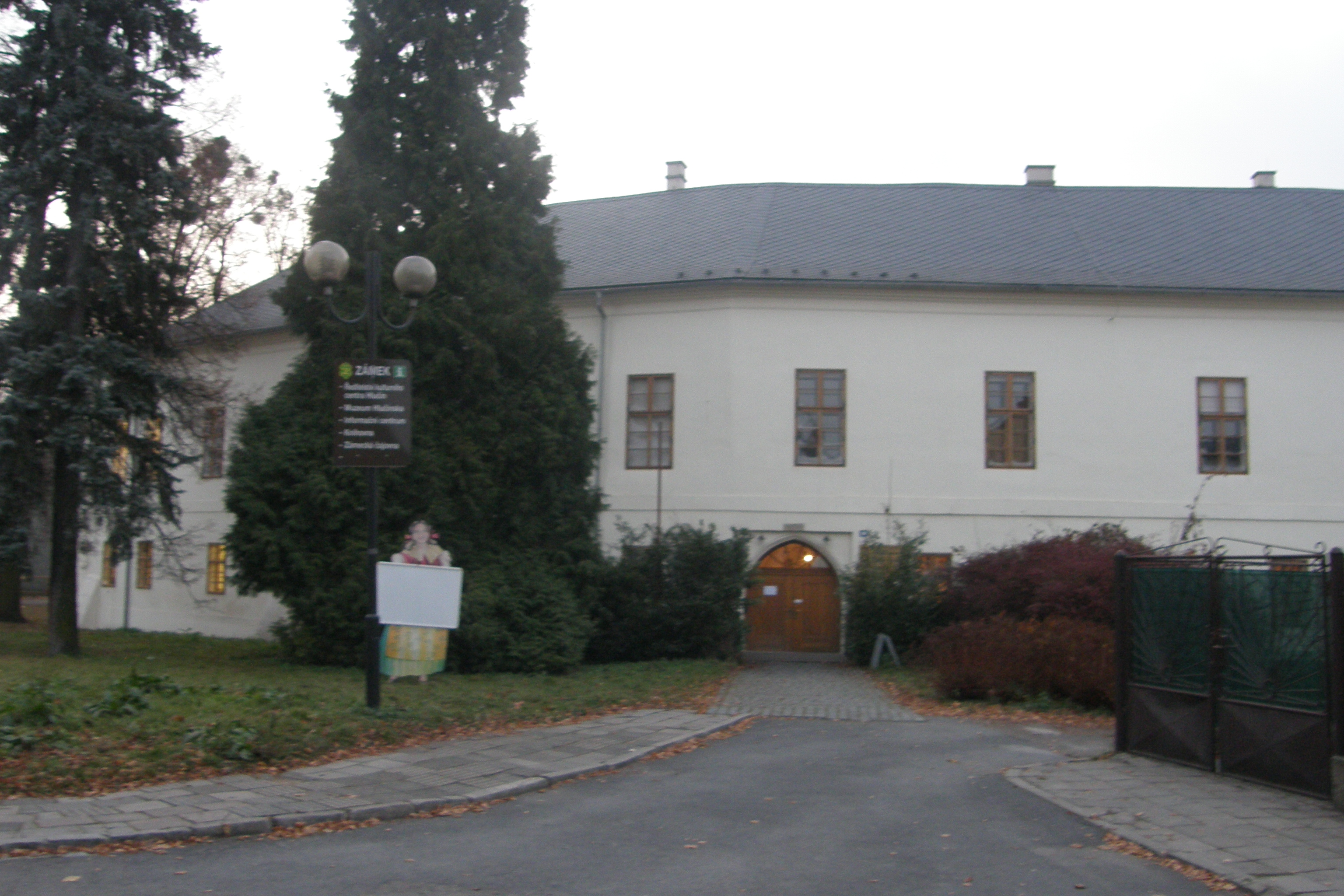 Zámek v Hlučíně